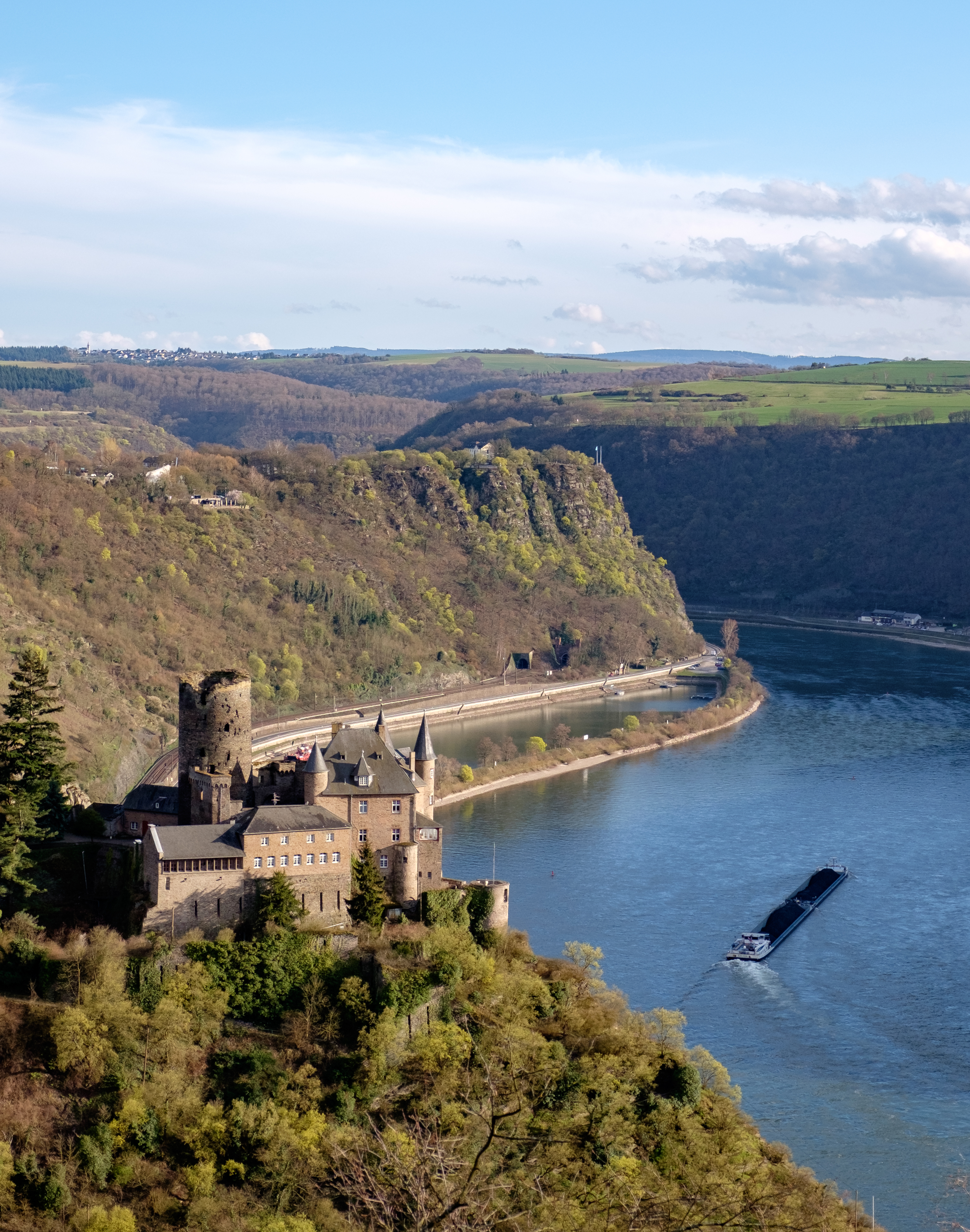 Burg Katz und Loreleyfelsen, von Dreiburgenblick bei Patersberg